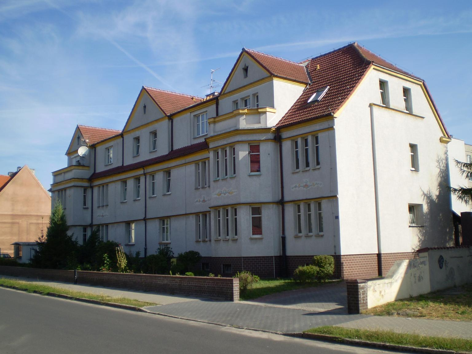 Gubin, ul. Kosynierów 12 - dawny komisariat MO, później Liceum Medyczne Pielęgniarstwa, obecnie dom mieszkalny